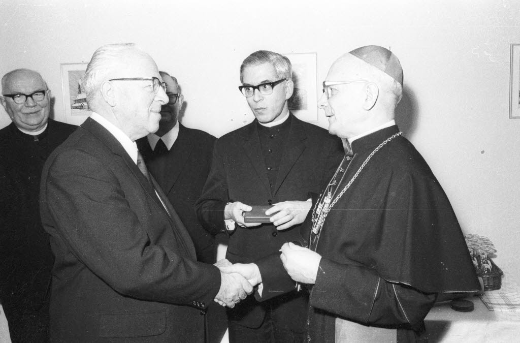 Weihbischof Johannes Albert von Rudloff (Hamburg, rechts) überbringt Landesdechant von de Berg (Mitte) die Ernennung zum päpstlichen Geheimkämmerer (Monsignore); Wilhelm Wagner, Vorsitzender des Landeskatholikenausschusses, wird zum Mitglied des Gregoriusordens ernannt.